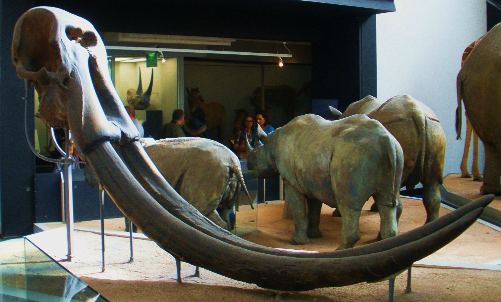 Fossil of Stegodon, an extinct mammal -- Took the photo at Natural History Museum, London